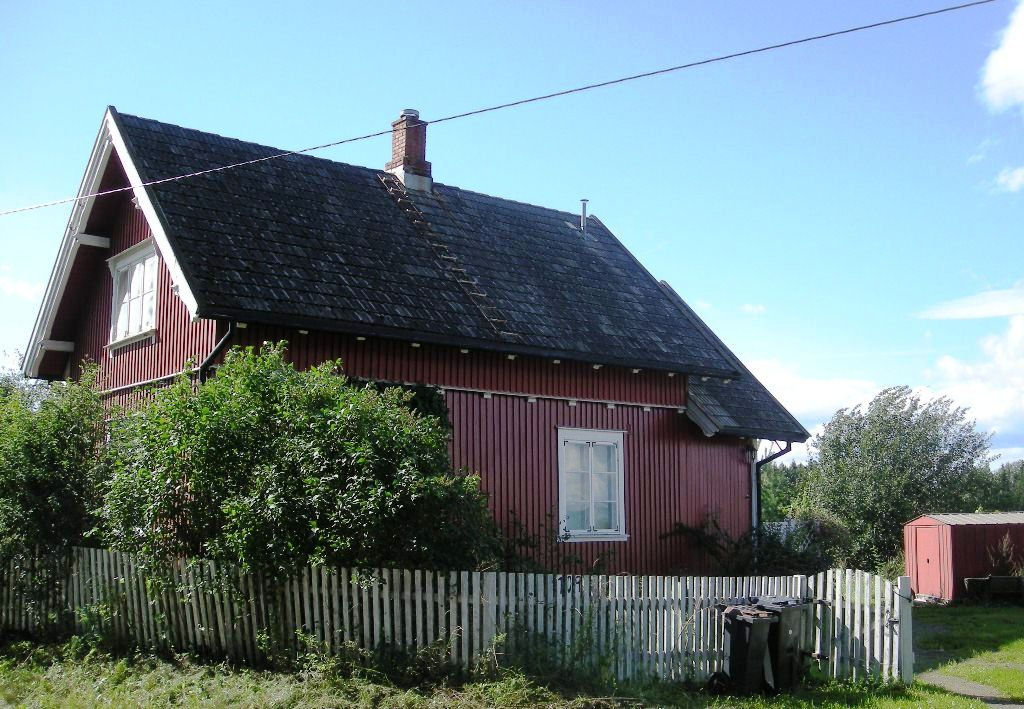 Gubberud vokterbolig ved Dovrebanene